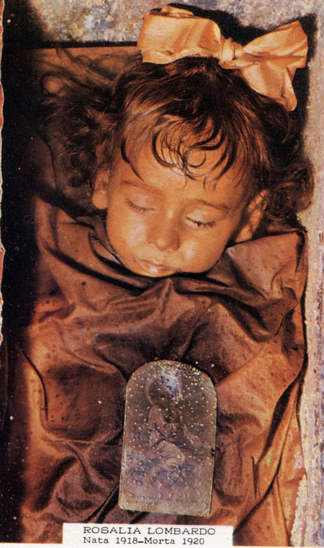 La mummia della bimba Rosalia Lombardo (1918-1920) esposta nel Cimitero dei Cappuccini a Palermo.